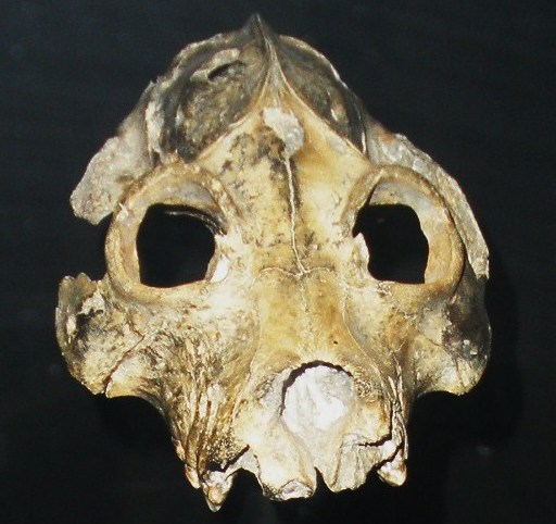 Fossil of Palaeopropithecus, an extinct mammal-- Took the photo at Natural History Museum, London